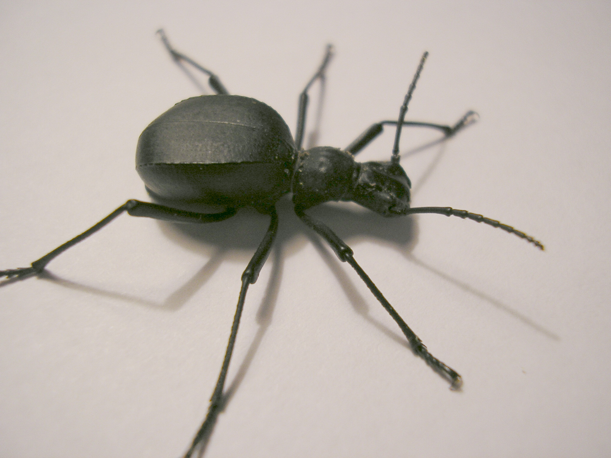 Elenophorus collaris (Coleoptera, Tenebrionidae)